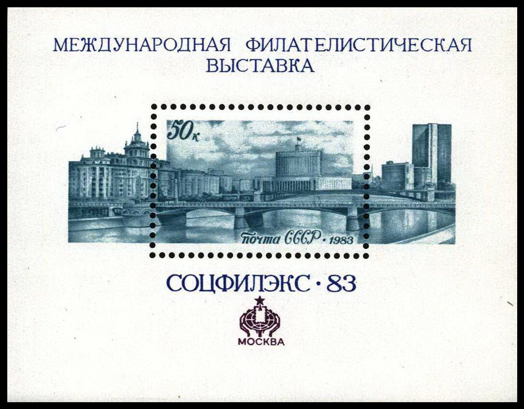 Почтовый блок СССР, посвящённый Международной филателистической выставке "Соцфилэкс-83", проходившей в Москве